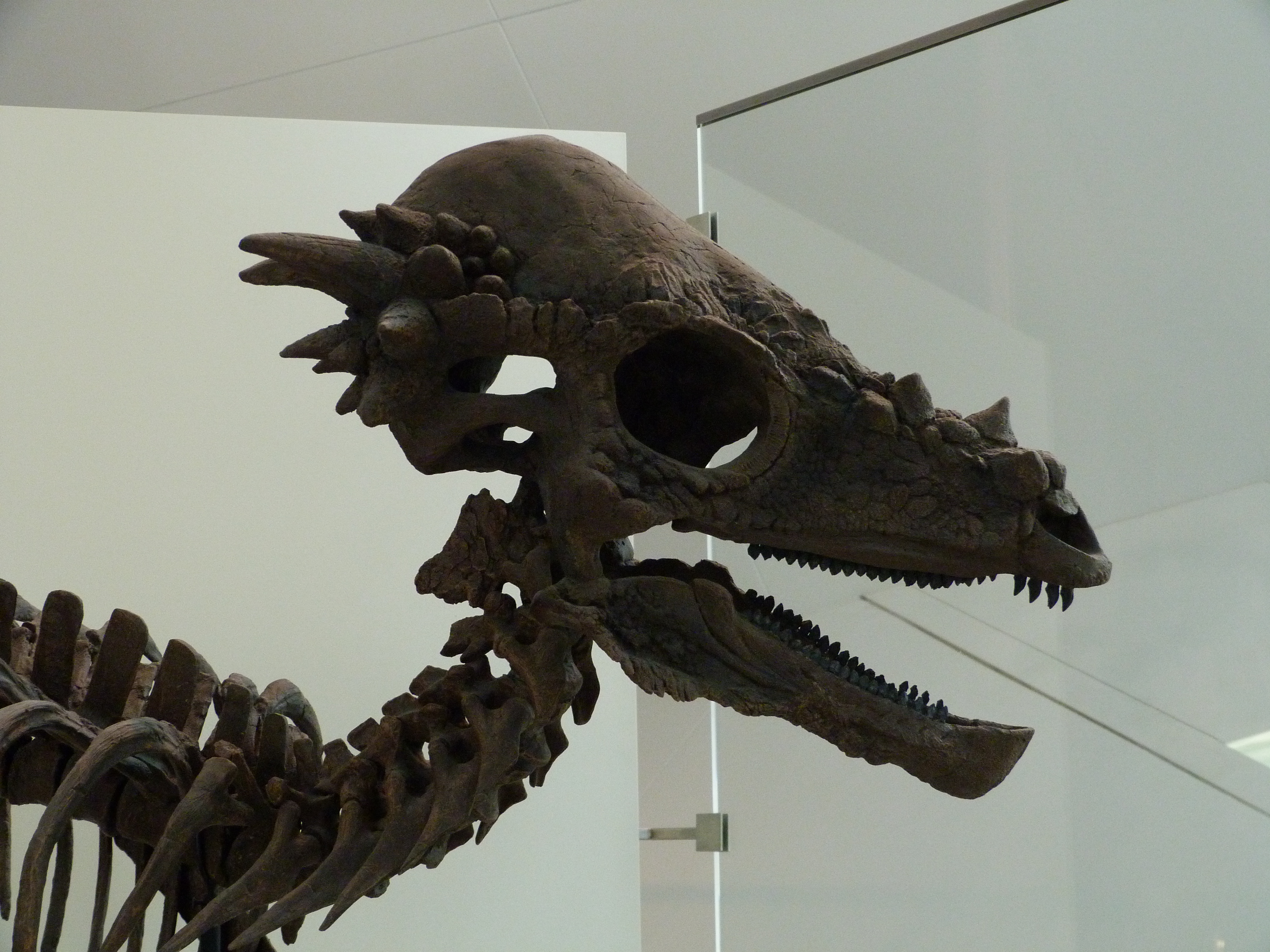 Royal Ontario Museum, Toronto, Canada